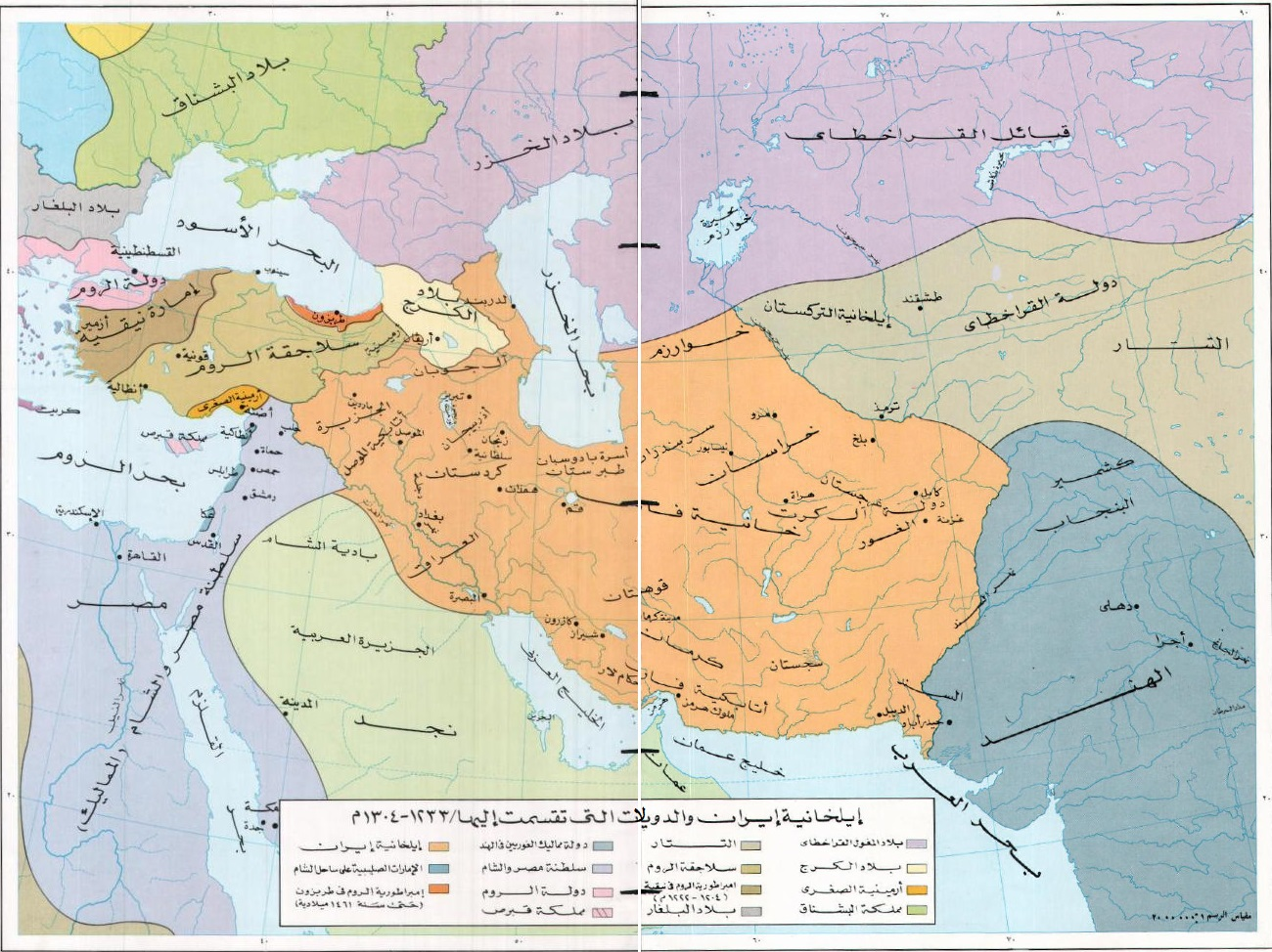 خريطة الدولة الإلخانيَّة والدُويلات التي تقسَّمت إليها.